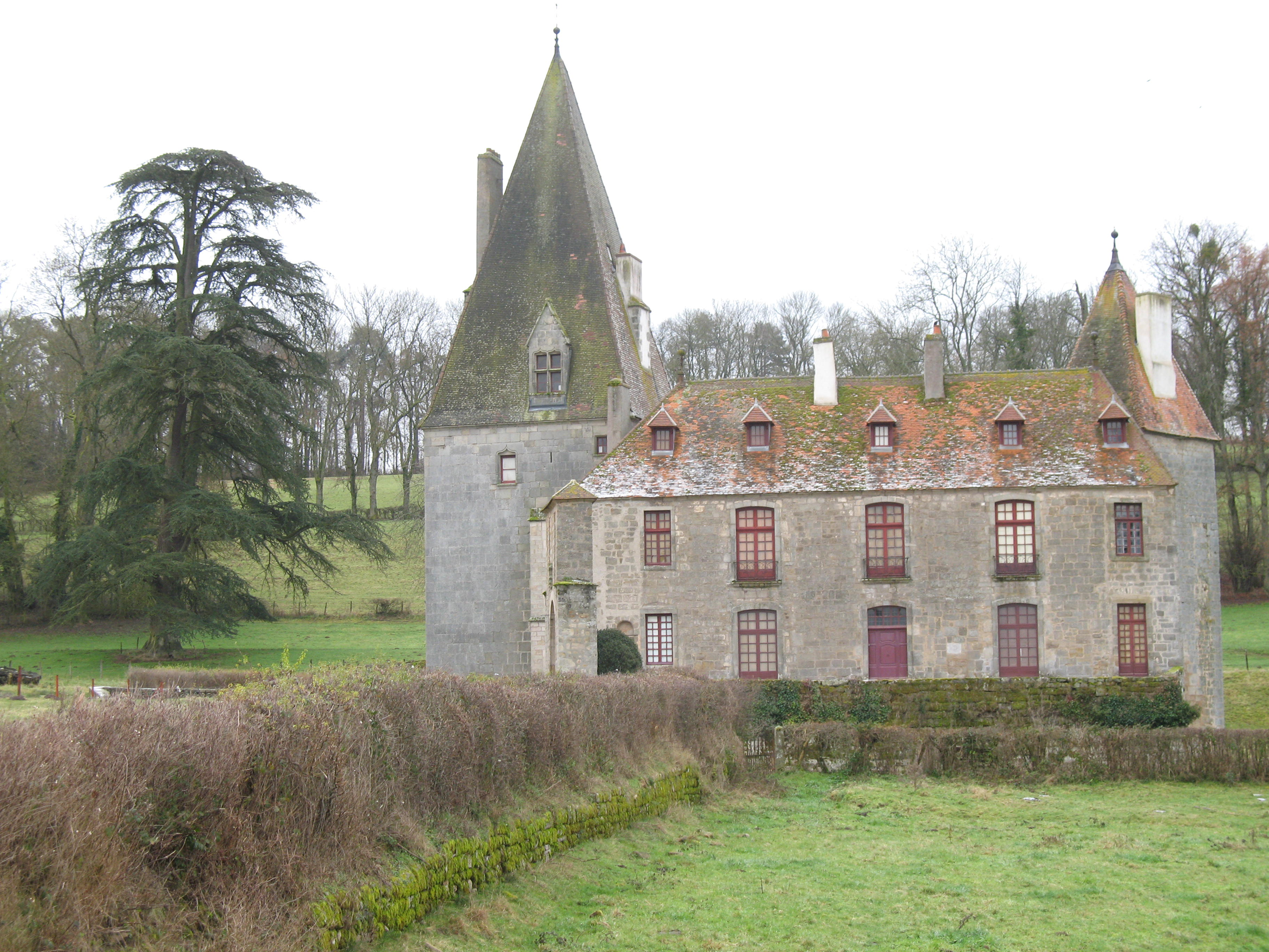 Le château de Morlet en Saône-et-Loire